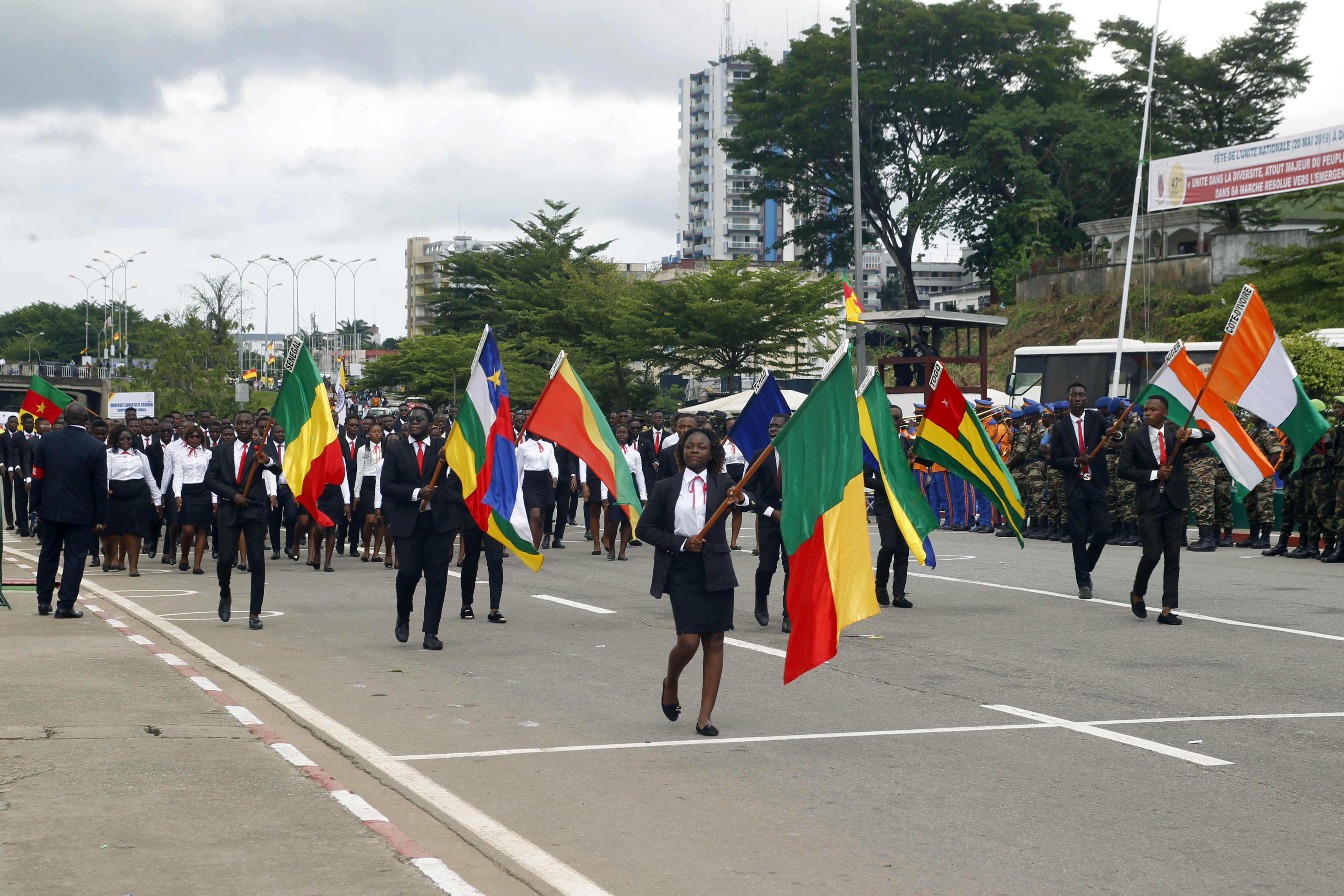 Les élèves et étudiants camerounais lors du défilé de la fête nationale du Cameroun le 20 mai 2019 à Douala This is an image with the theme "Africa on the Move or Transport" from: Cameroon